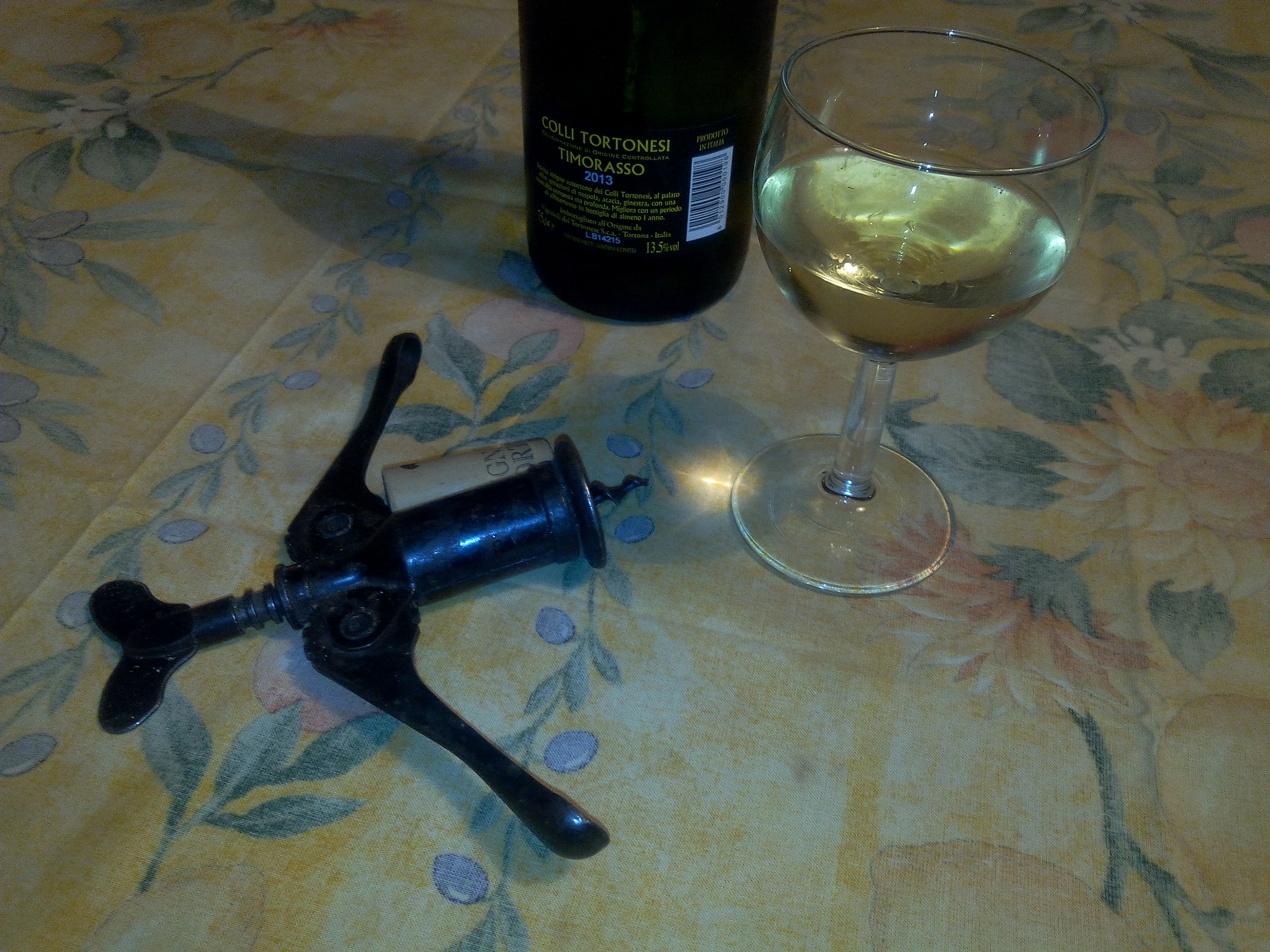 Un bicchiere di Timorasso, vino dell'Alessandrino (Piemonte, Italia)